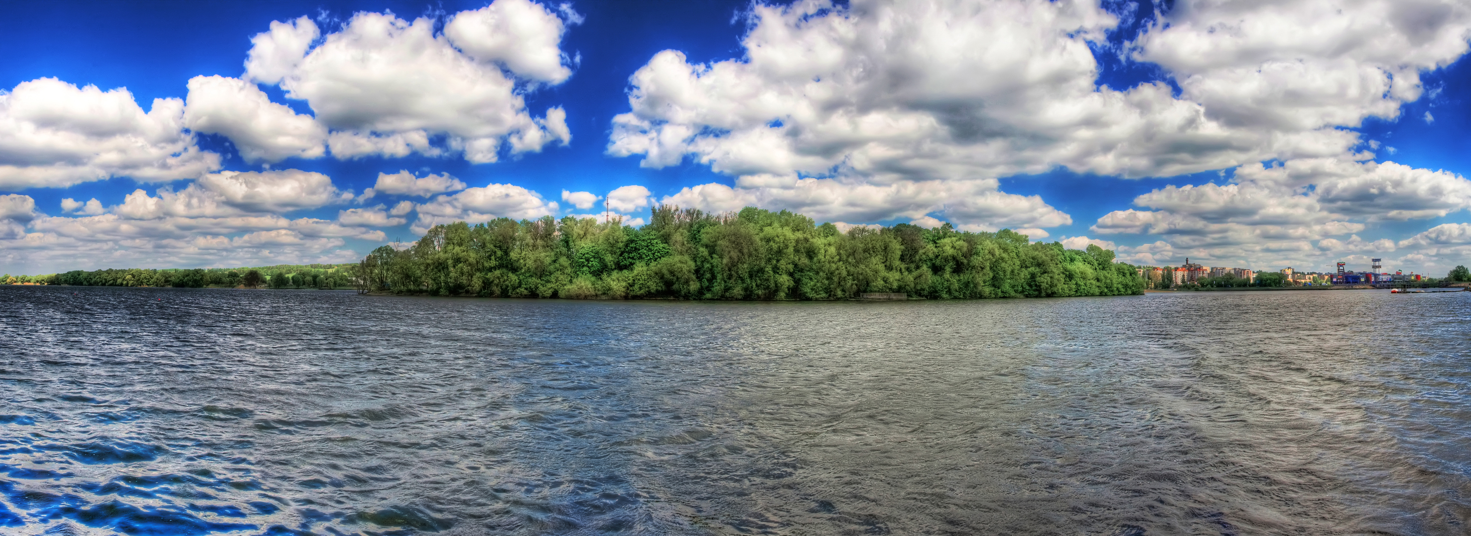 Парк ім.. М. Чекмана, м. Хмельницький по вул. Котовського